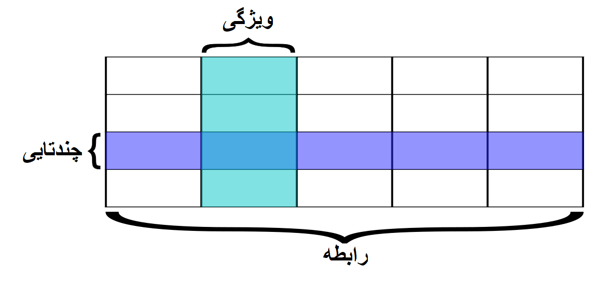 اصطلاحات پایگاه داده رابطه‌ای ارائه شده است.